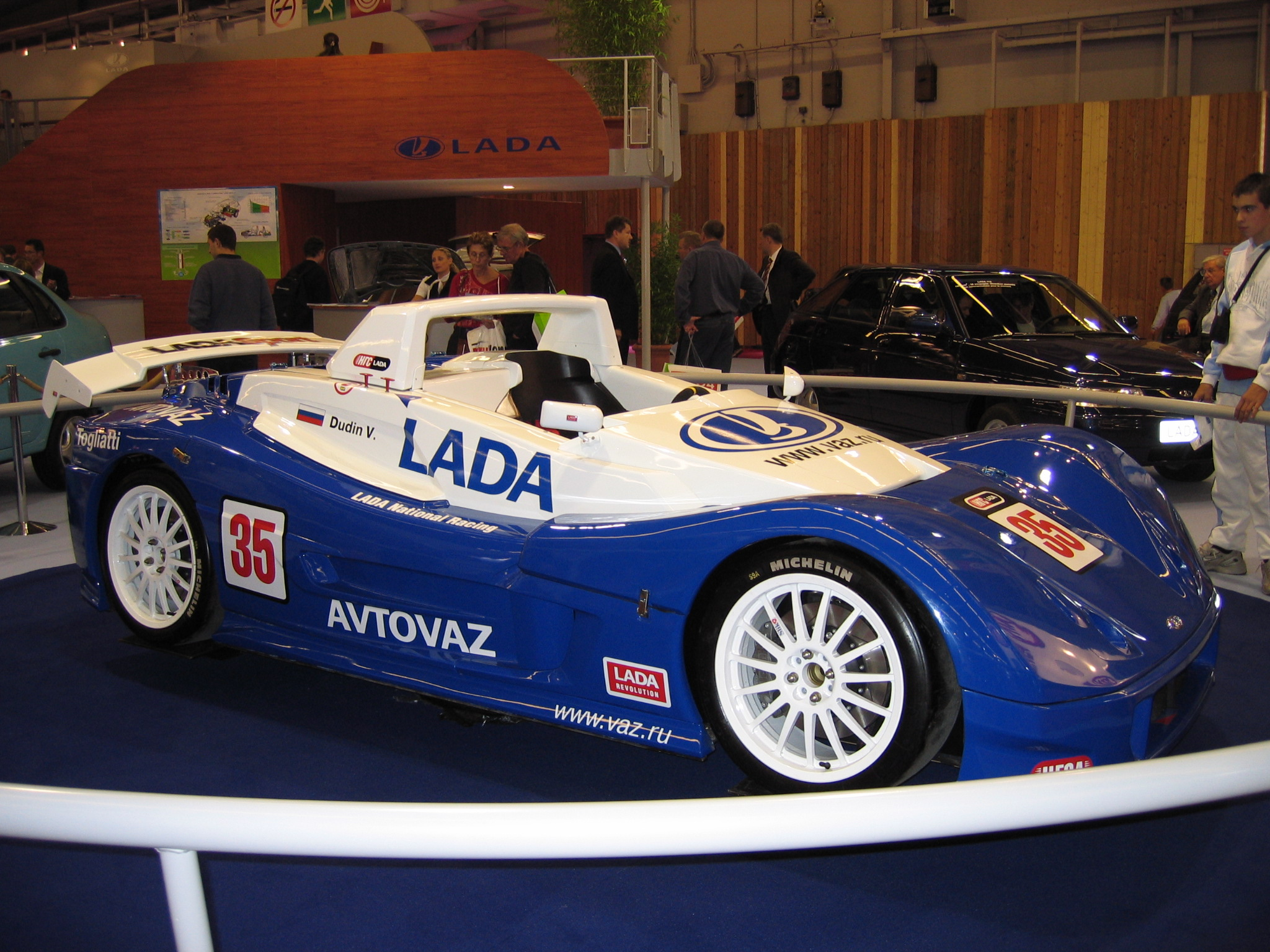 Lada Revolution op het Parijse autosalon van 2004. Eigen werk, vrij voor het publiek.